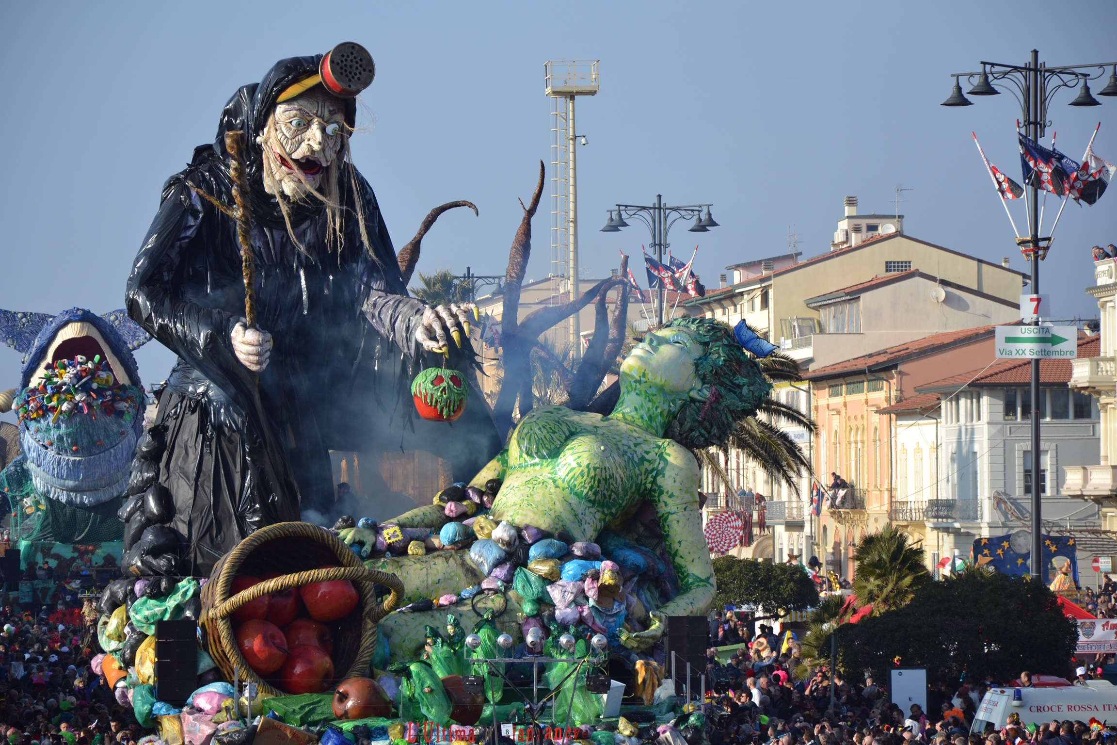 carro di prima categoria vincitore del Carnevale di Viareggio 2019